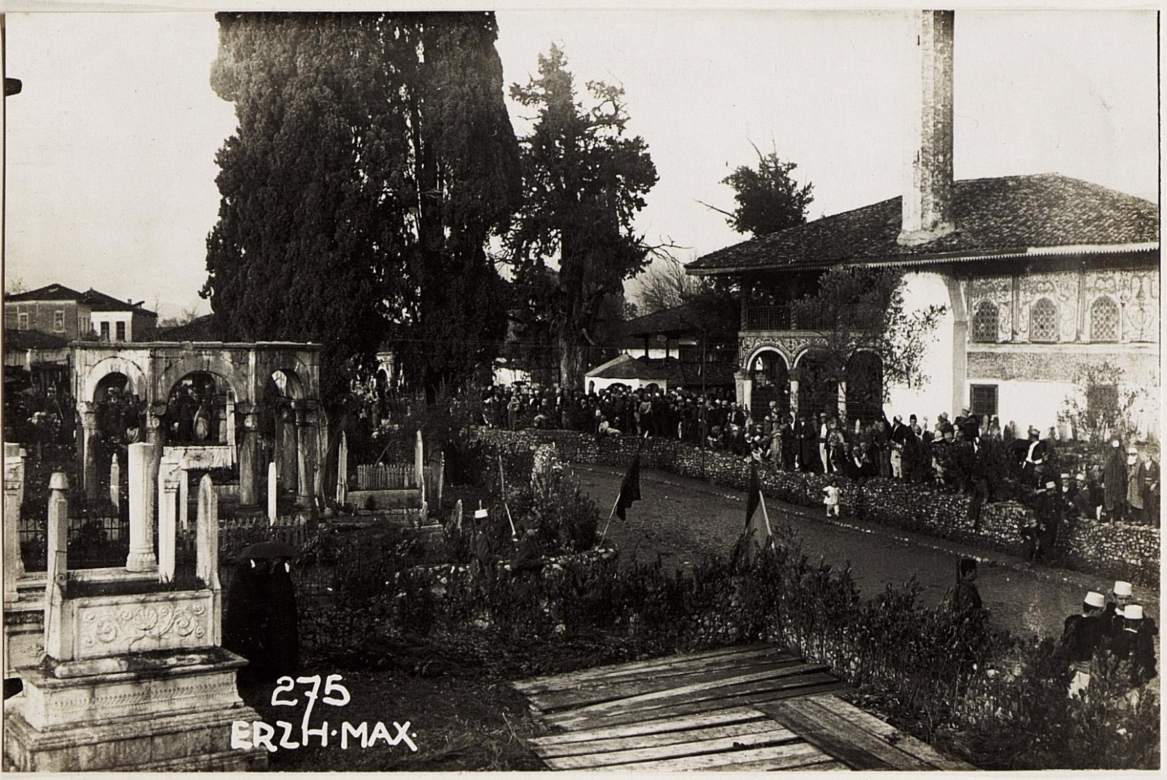 Moschee und Ahnengräber Essad Pascha, Tirana.